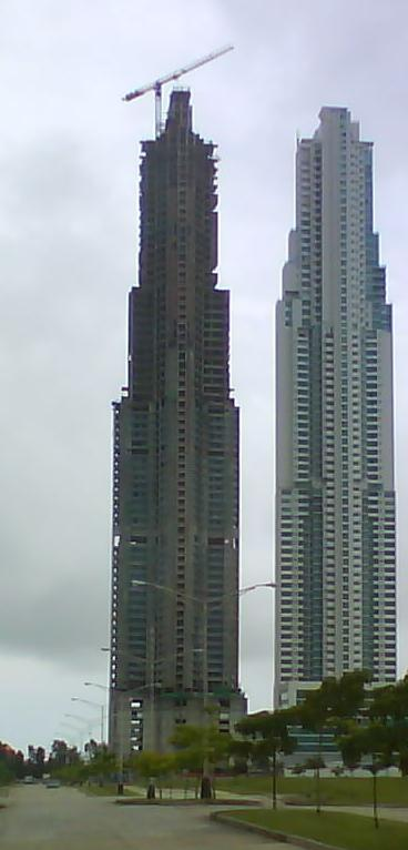 Torre Vitri, Ciudad de Panamá, Panamá.